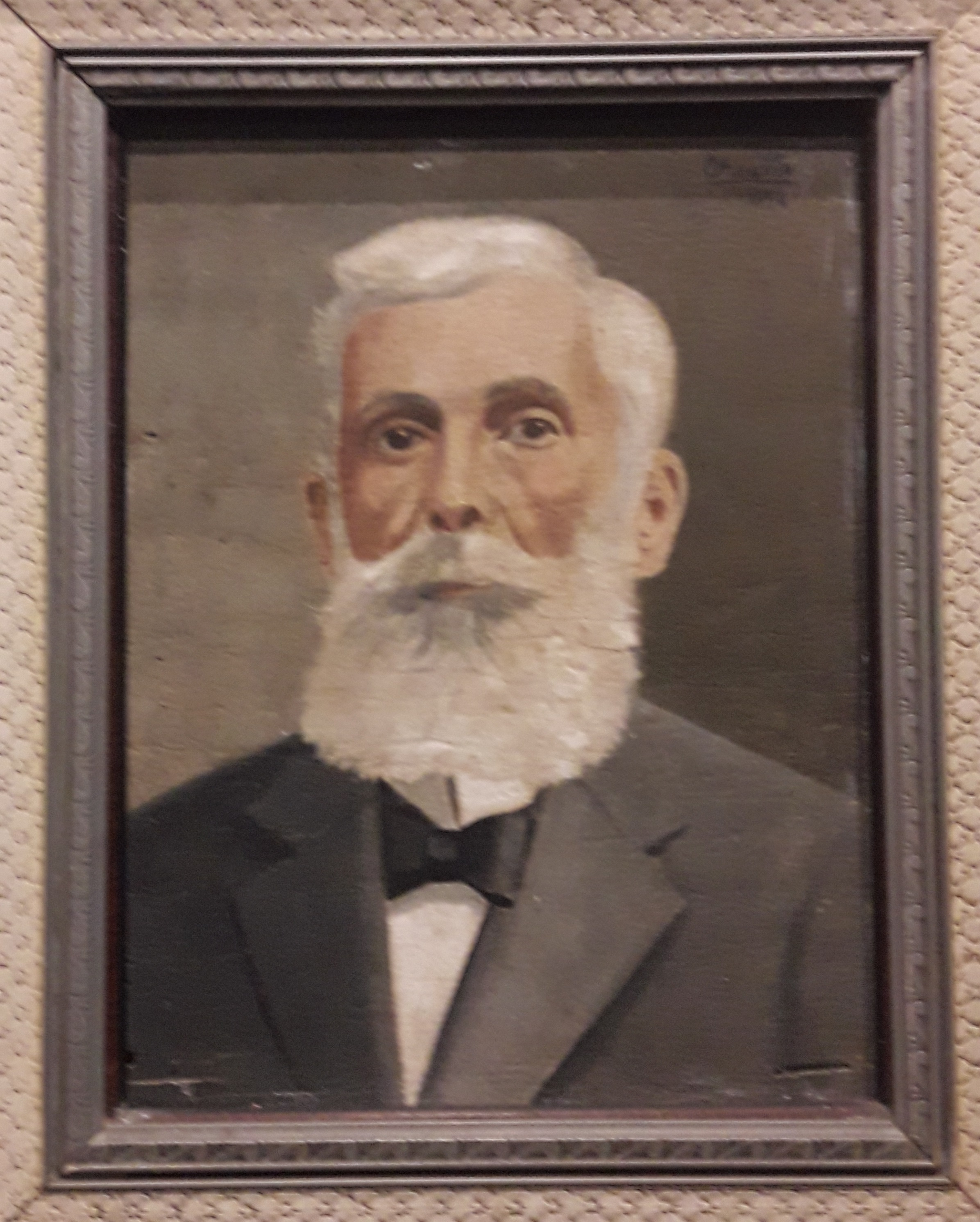 Rodolfo Teófilo - Obra de Otacílio de Azevedo (1956)